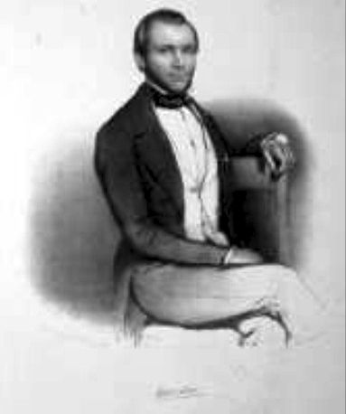 W.L. Overduyn door Arnaud Gerkens, 1848-1868